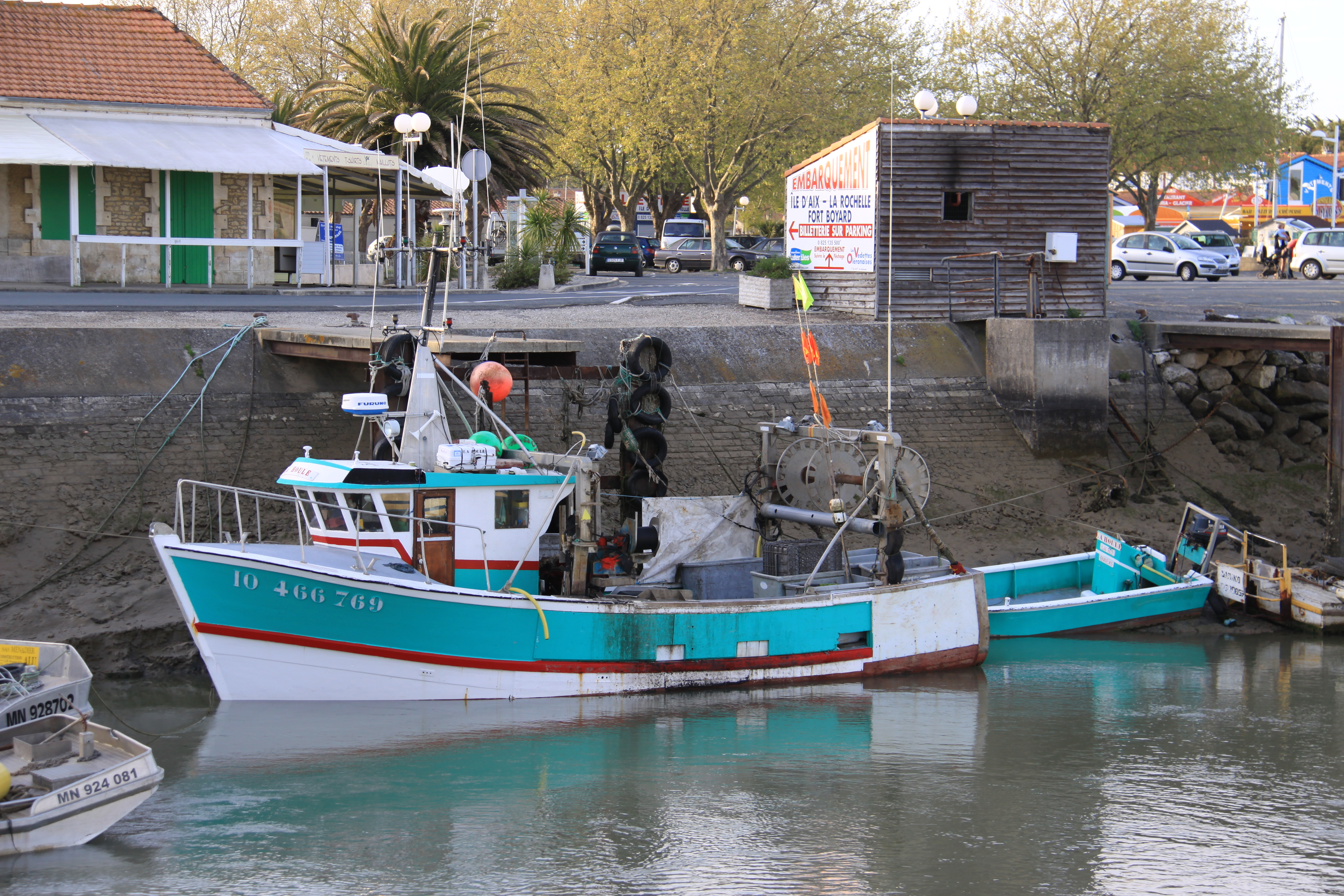 Un chalutier de pêche côtière à son emplacement de ponton dans le chenal de La Perrotine à Boyardville un soir du mois d' avril. Boyardville, Île d' Oléron, Charente Maritime, France.